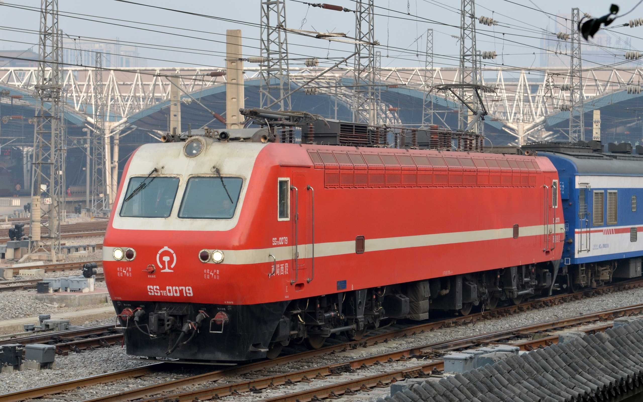 中文（中国大陆）: 配属西局西段的韶山7E型(SS7E)0079号电力机车担当牵引北京西至西安T41次特快列车的任务正驶离北京西客站